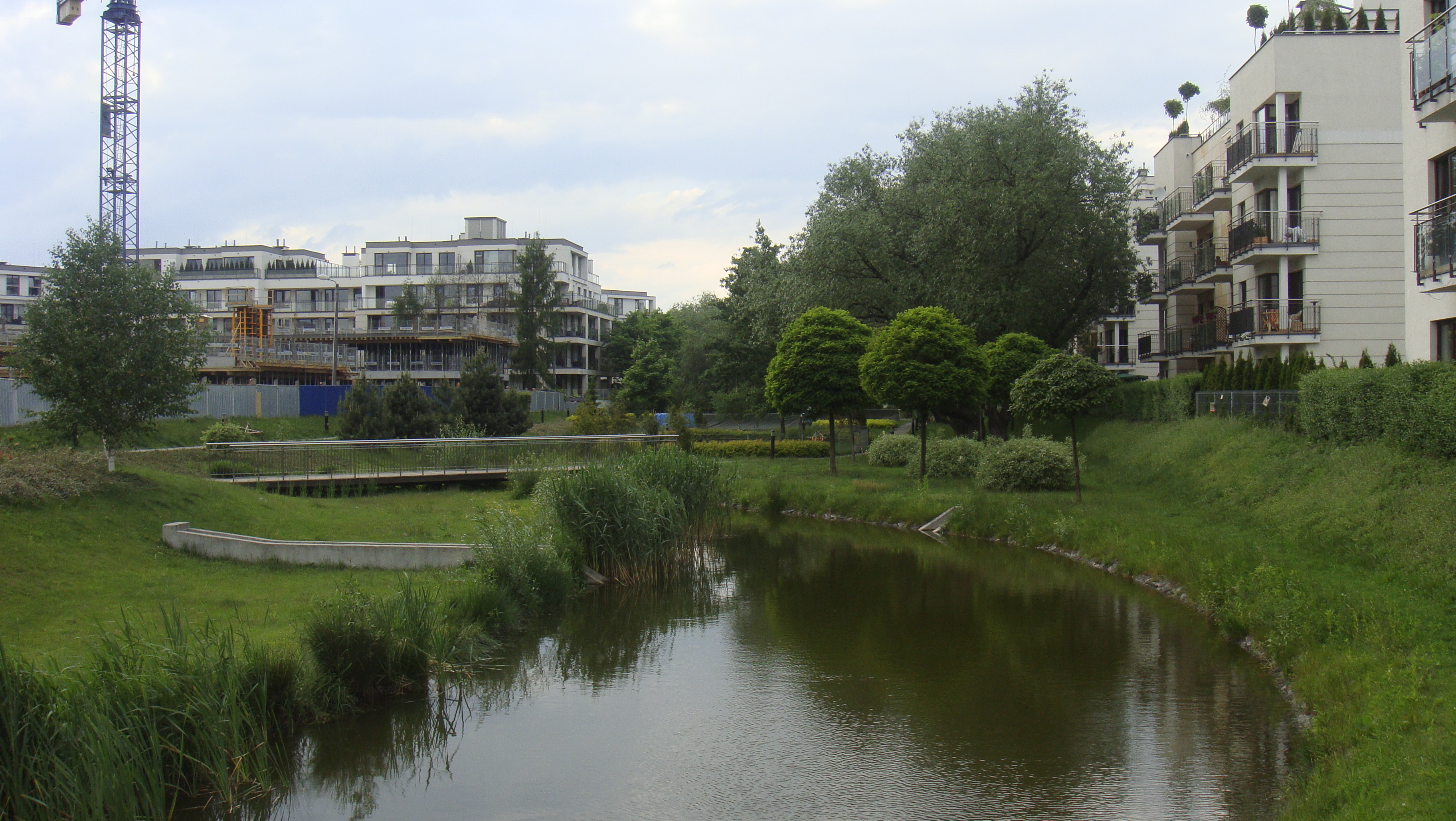 Półprywatna przestrzeń pomiędzy kwartałami w Ostoii Wilanów